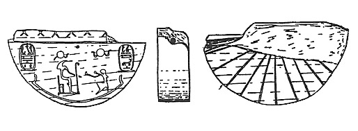 Horloge solaire découverte à Gezer (règne de Mérenptah)